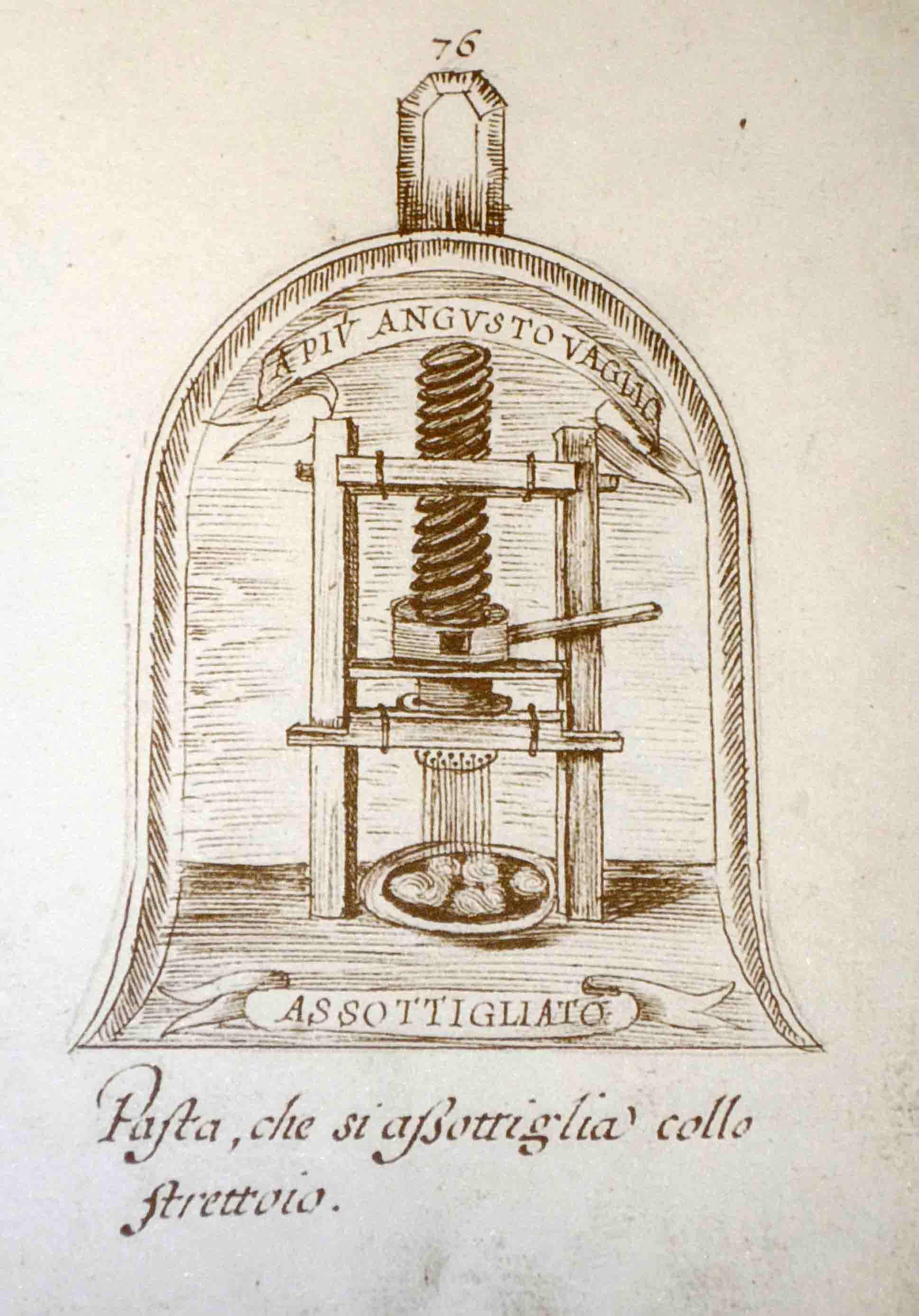 Disegno del torchio da pasta raffigurato nella pela dell’Accademia della Crusca